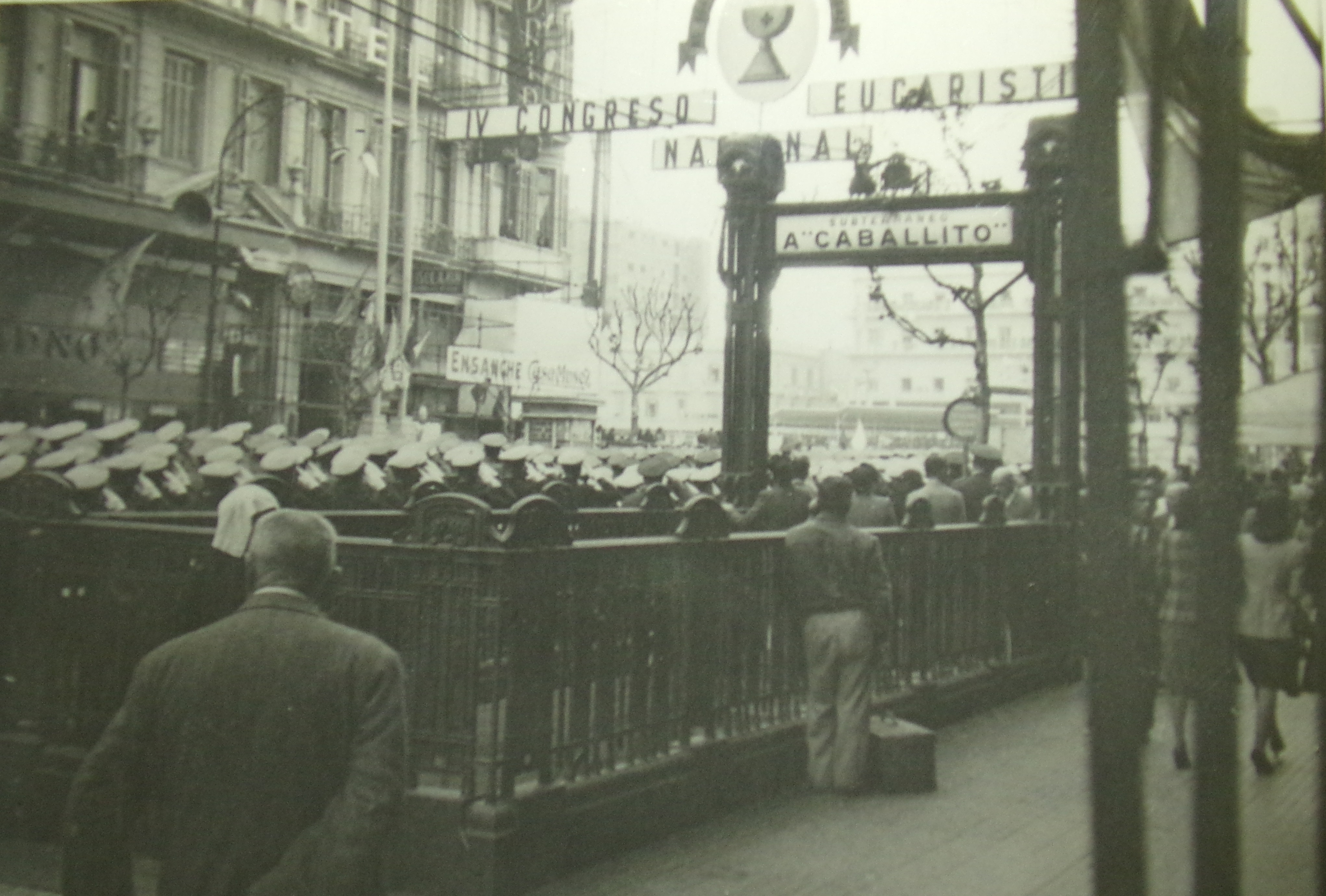 Avenida de Mayo y 9 de Julio. IV. Buenos Aires, 12 al 15 de octubre de 1944 (10° aniversario del Congreso Eucarístico Internacional)